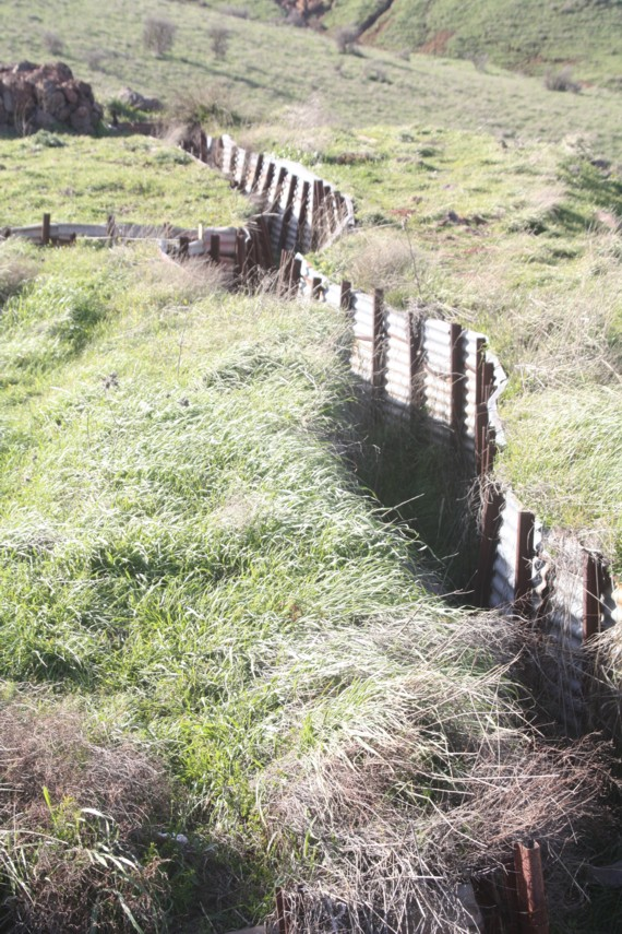 הר חרמונית. חפיר למרגלות הר חרמונית.